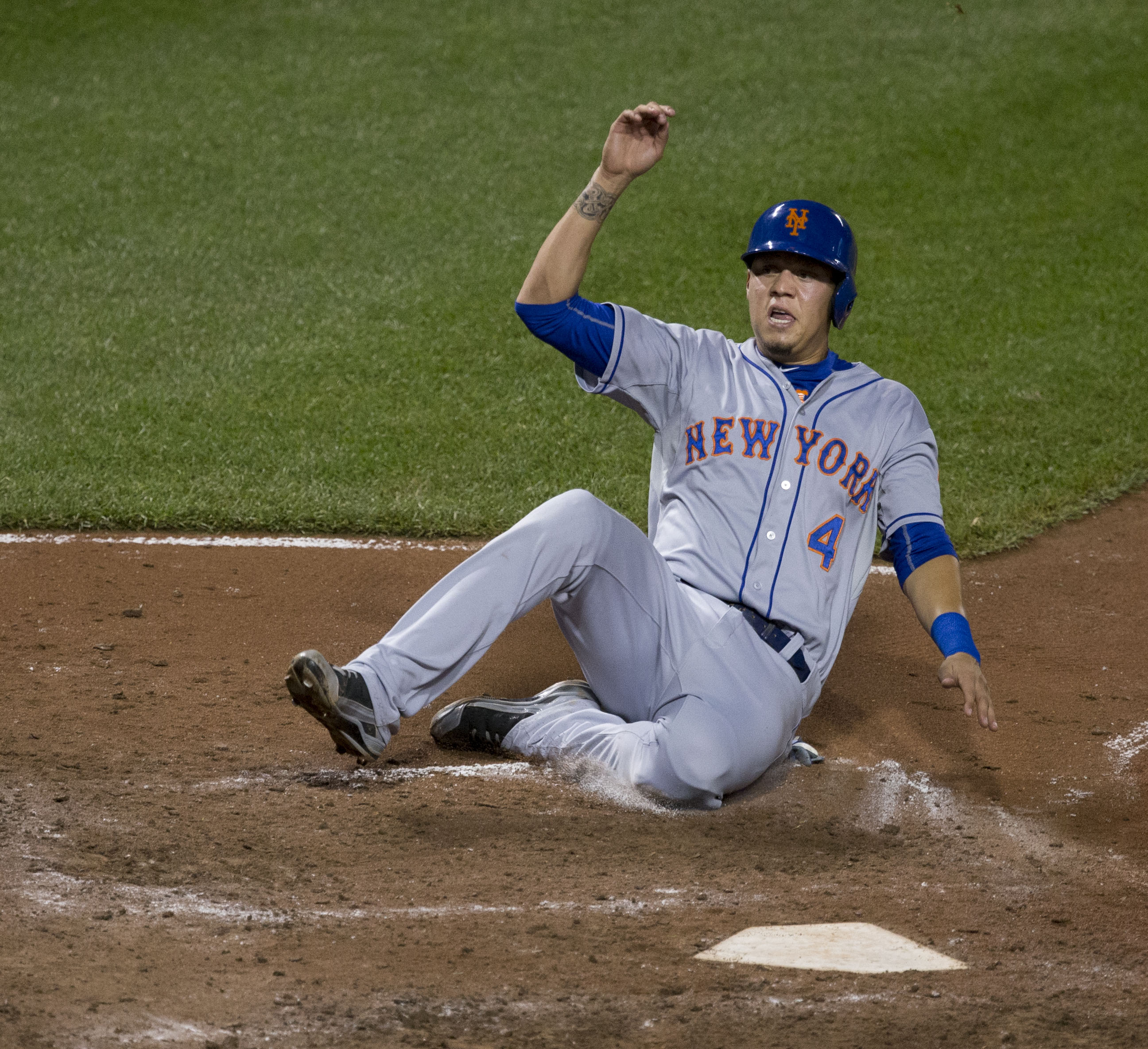 Mets at Orioles 8/18/15